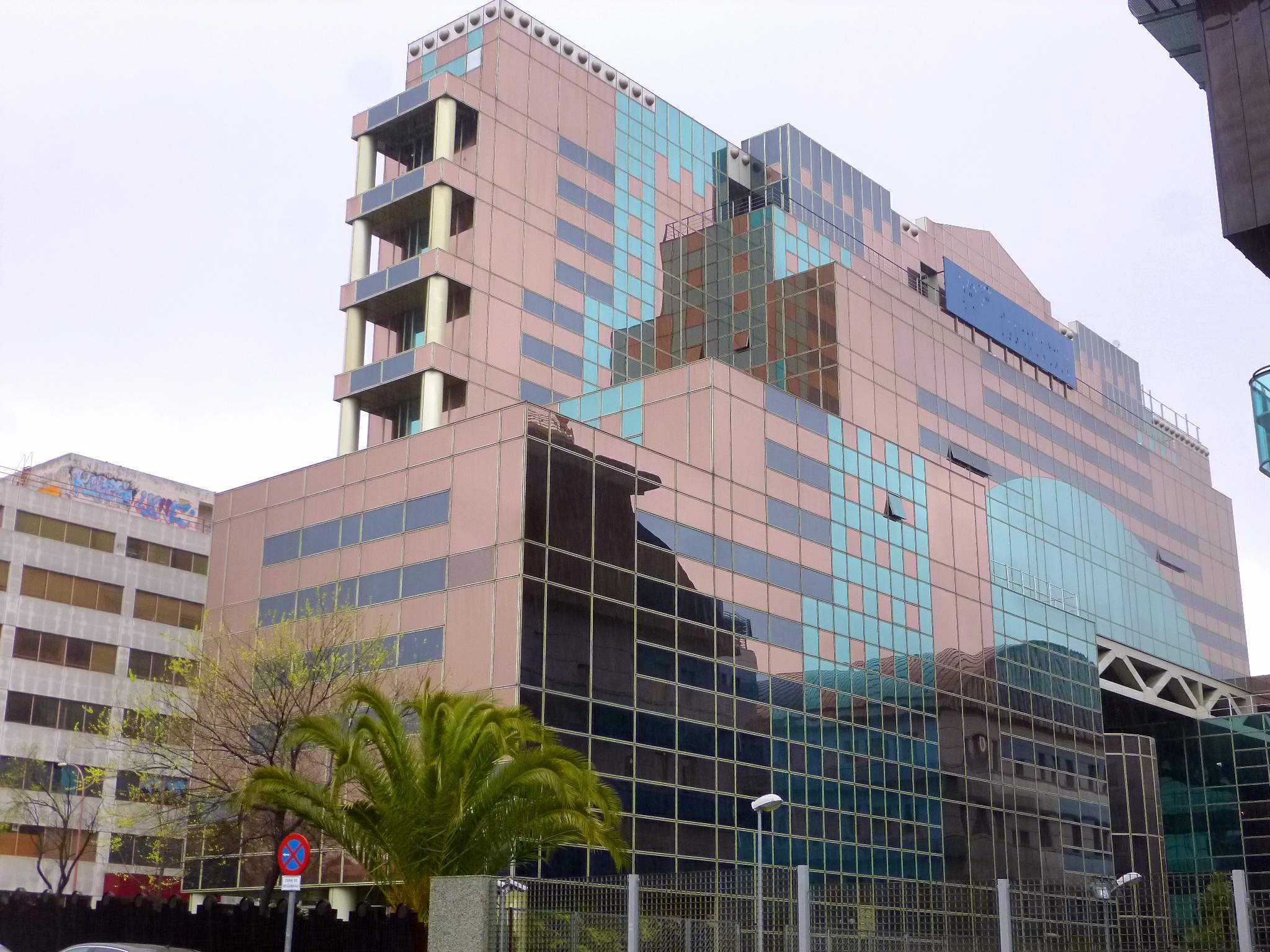 Sede del diario La Razón en Madrid, entre las calles Telémaco y Josefa Valcárcel (barrio de Salvador, distrito de San Blas-Canillejas)